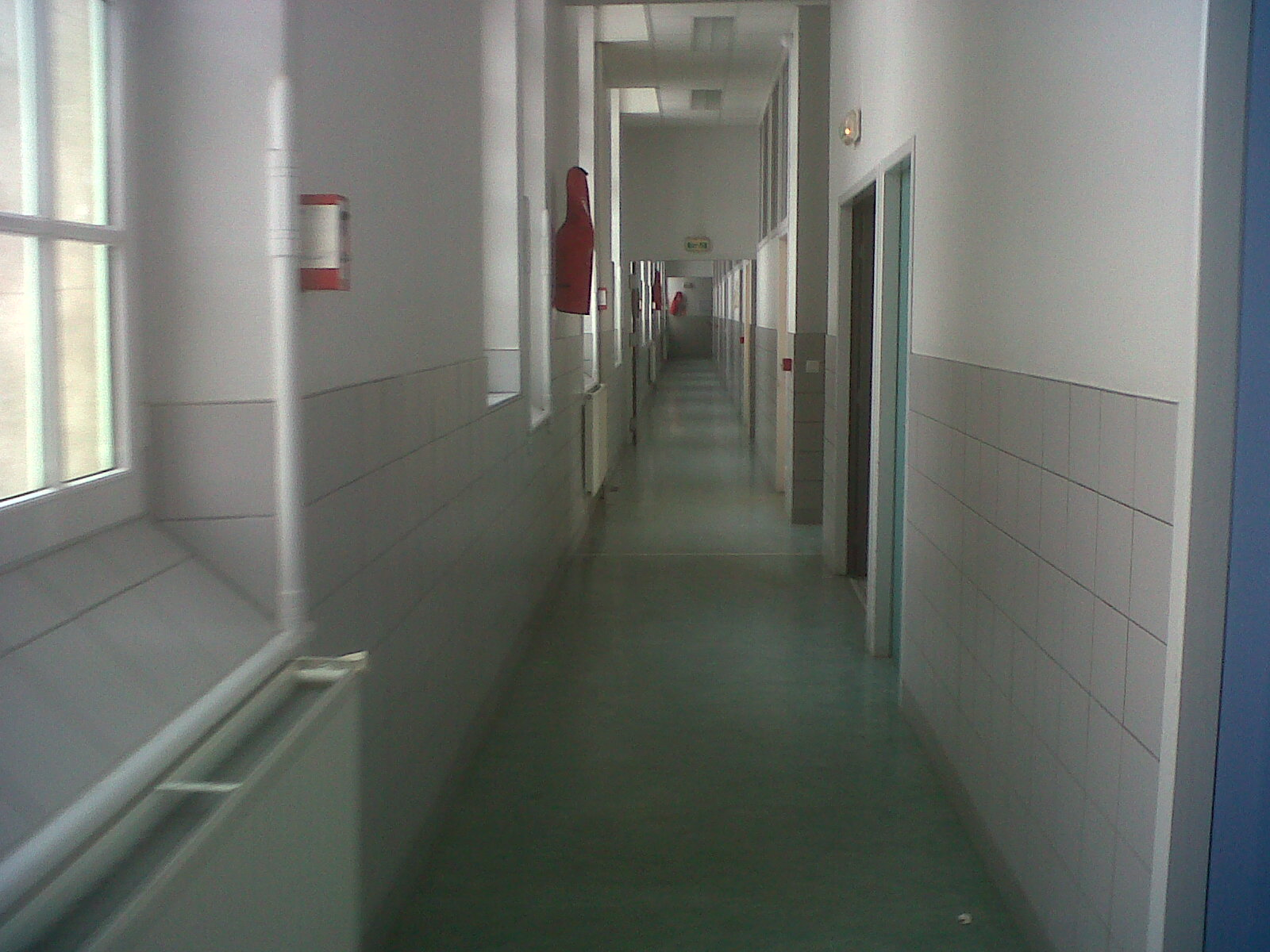 Couloir du 1er étage, Bâtiment Victor Hugo.